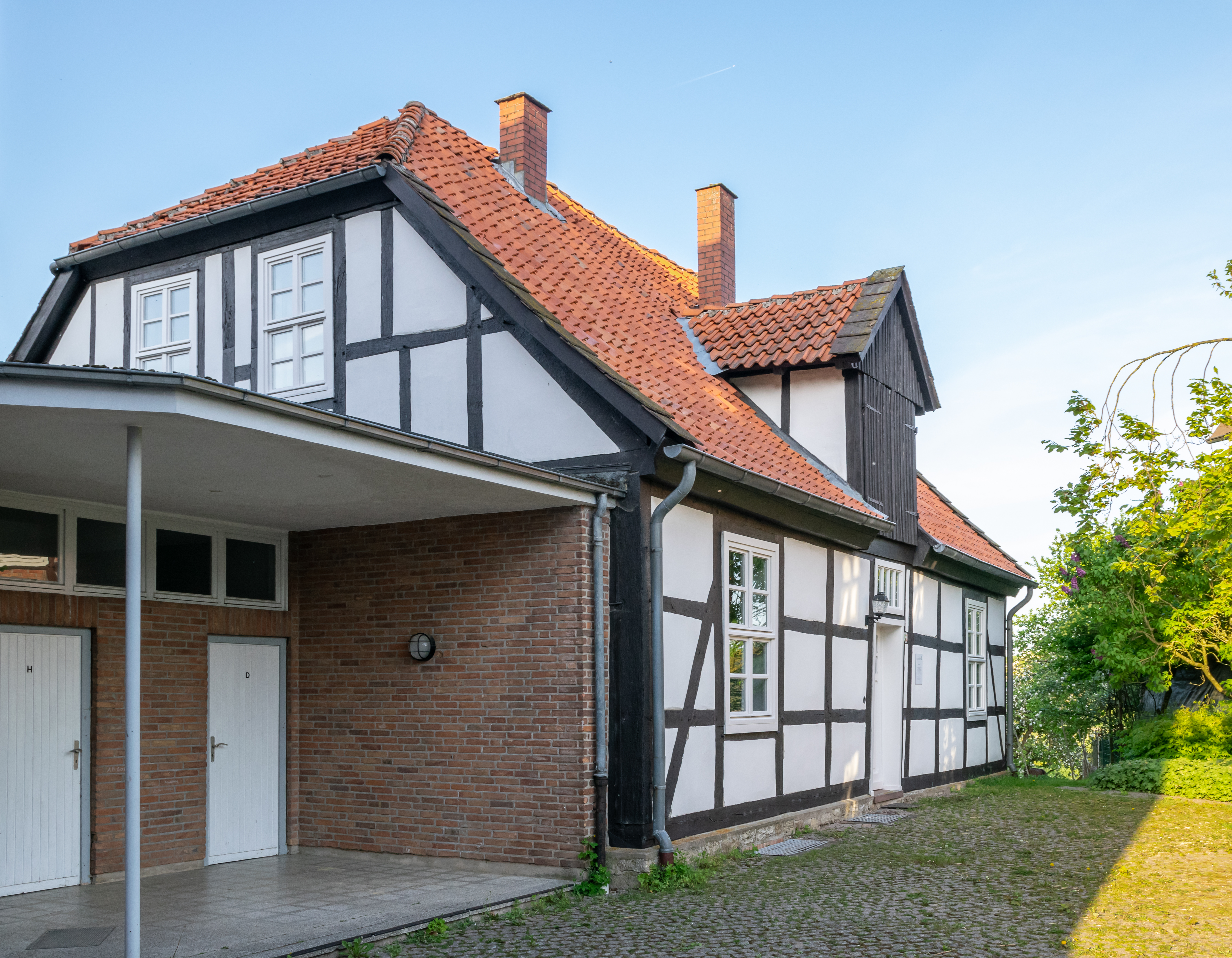 Peter-Hille-Haus in Nieheim-Eriwtzen